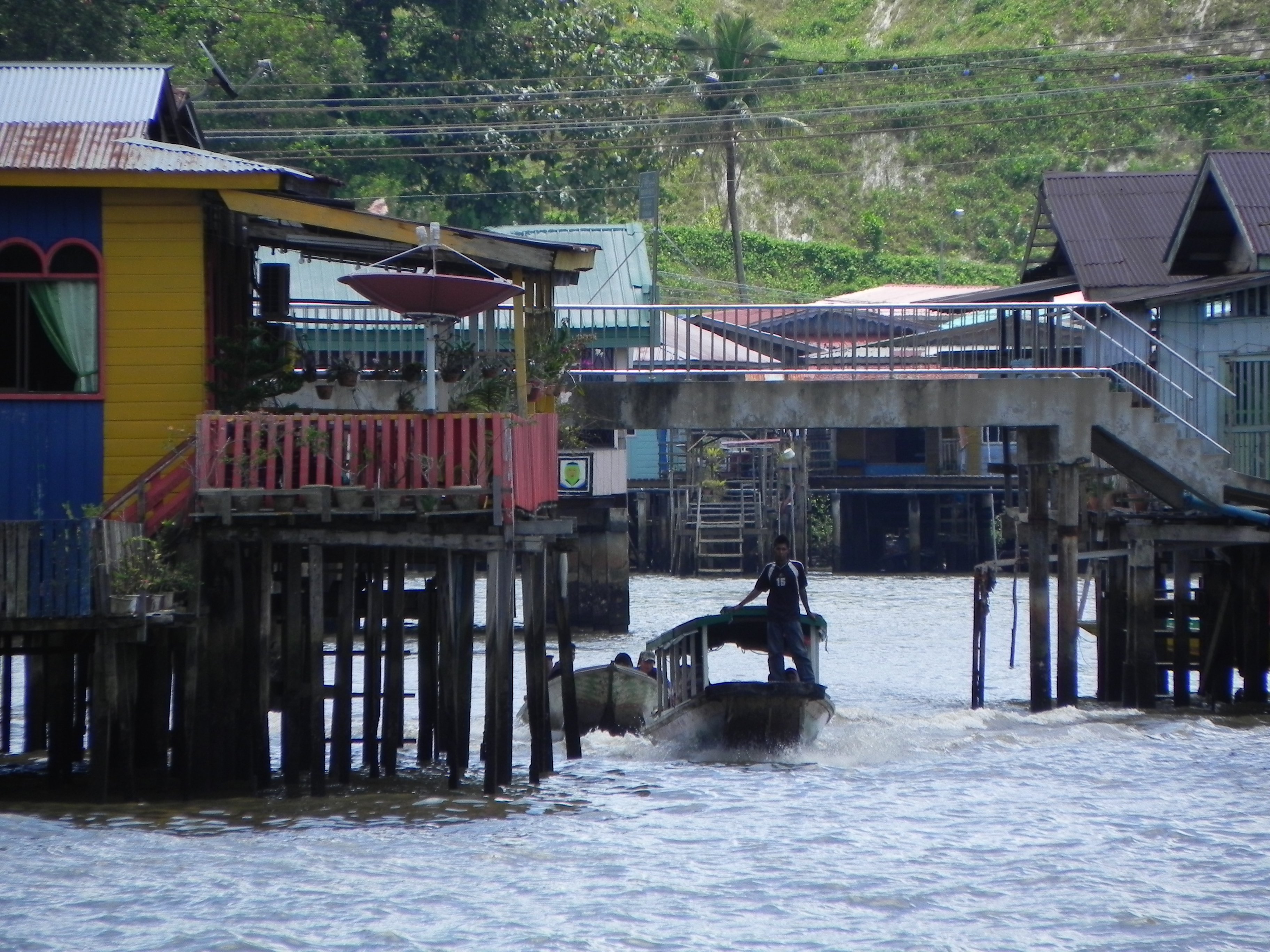 Im Wasserdorf Kampong Ayer am Brunei-Fluss